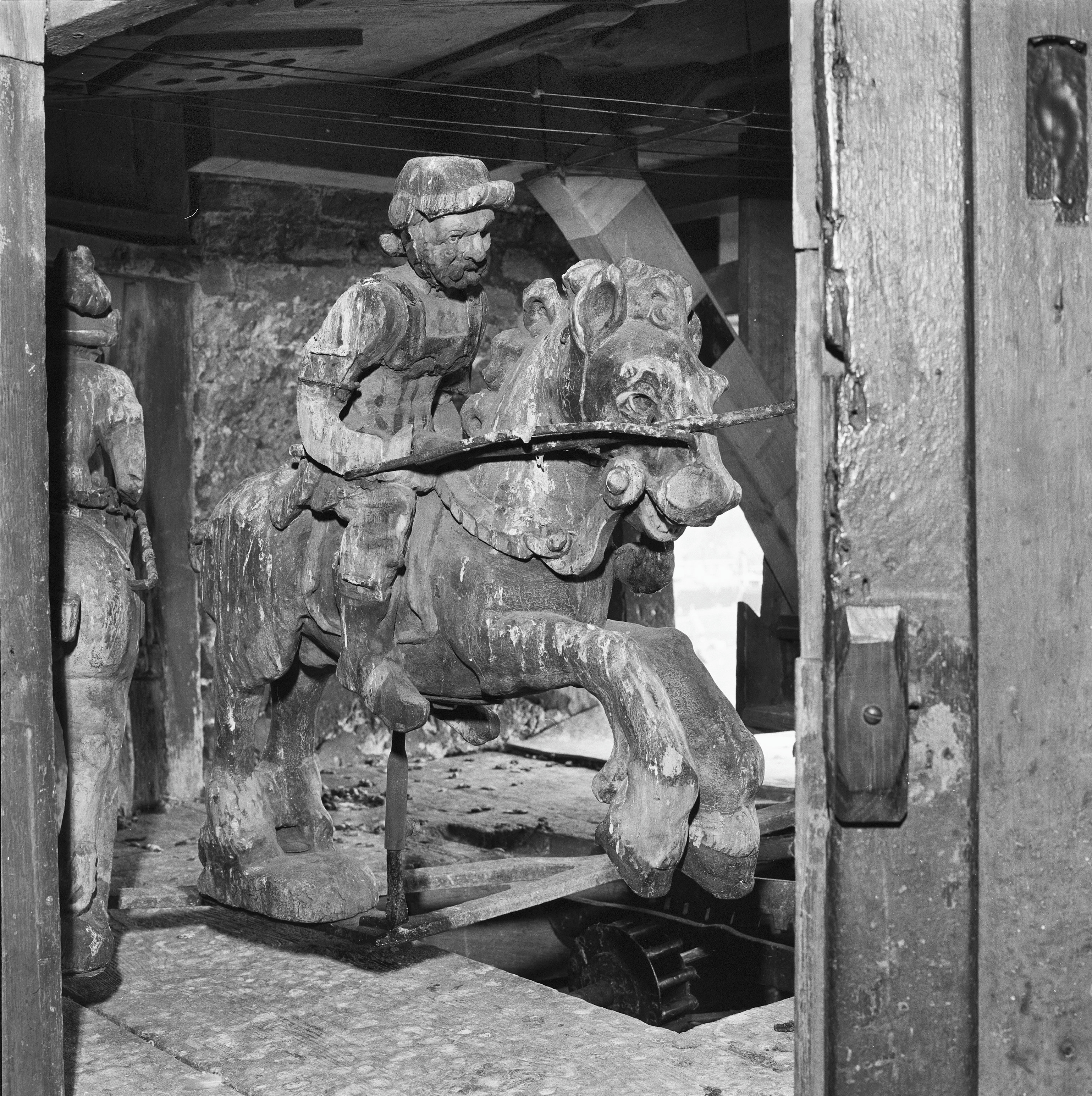 WAAG: INTERIEUR, TOREN, KLOKKENSPEL, RUITERSPEL, DETAIL